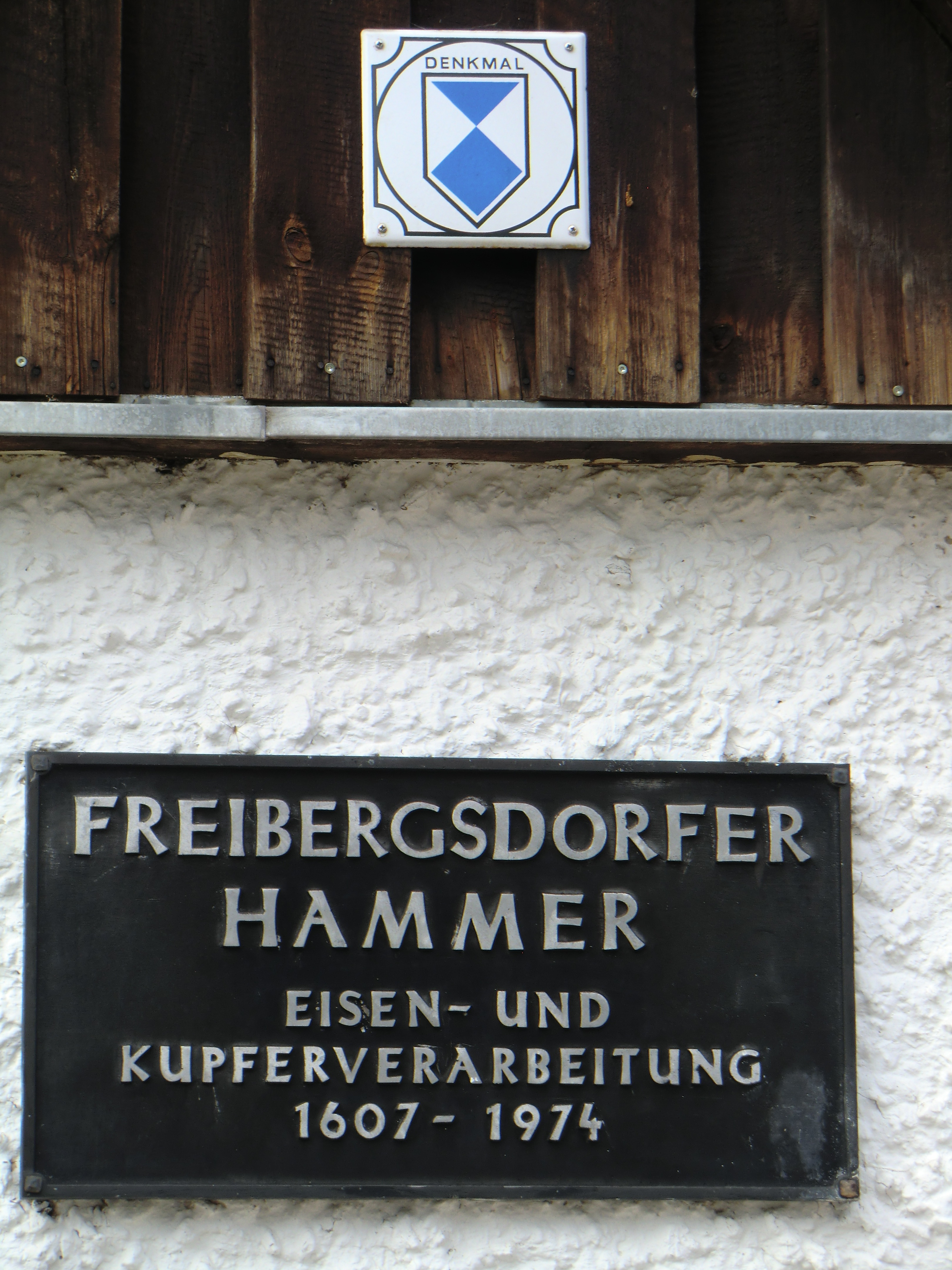 Fassadendetail am Freibergsdorfer Hammer mit Denkmalzeichen